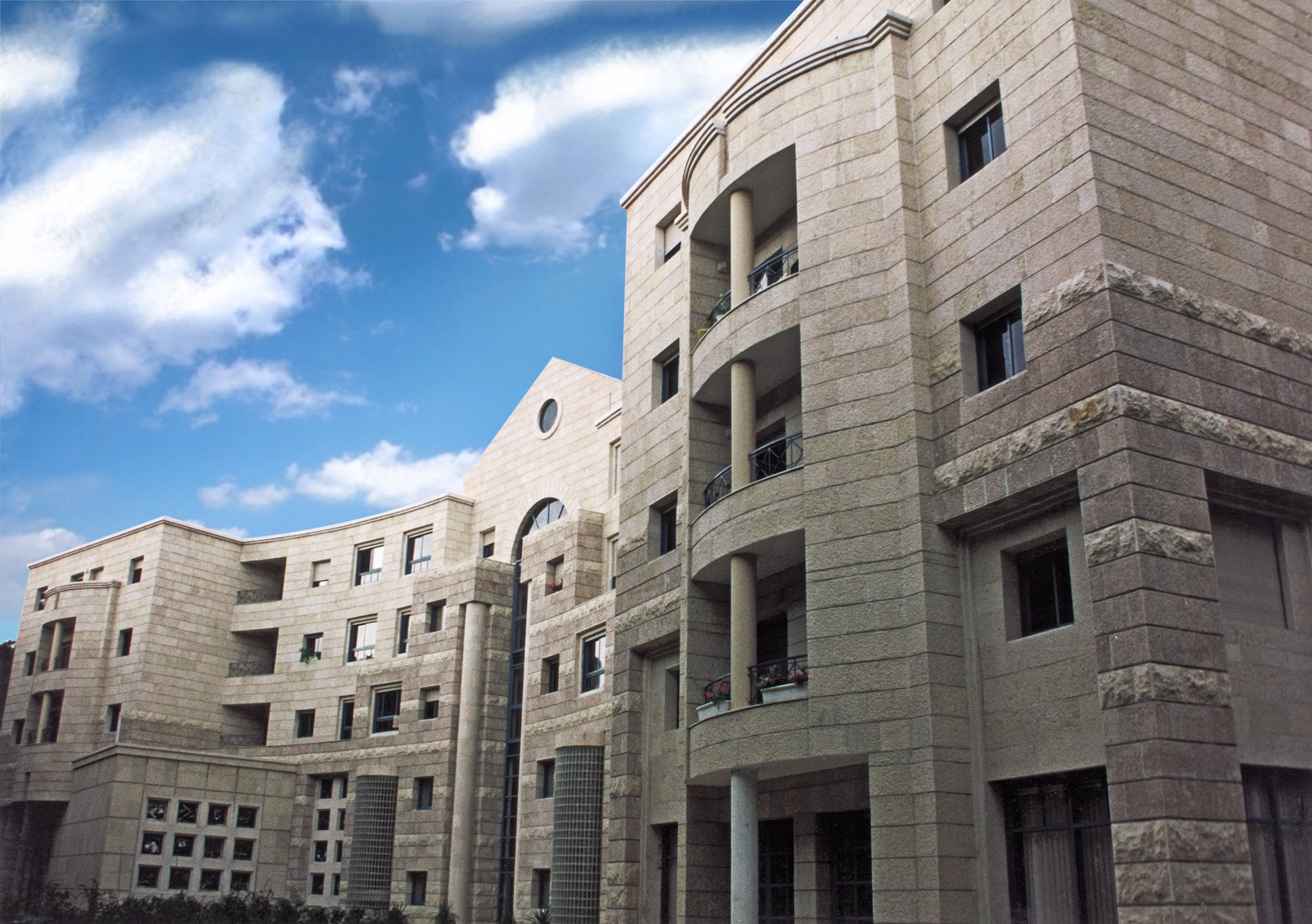 בית אבות לאנוסי משהד, הרצליה